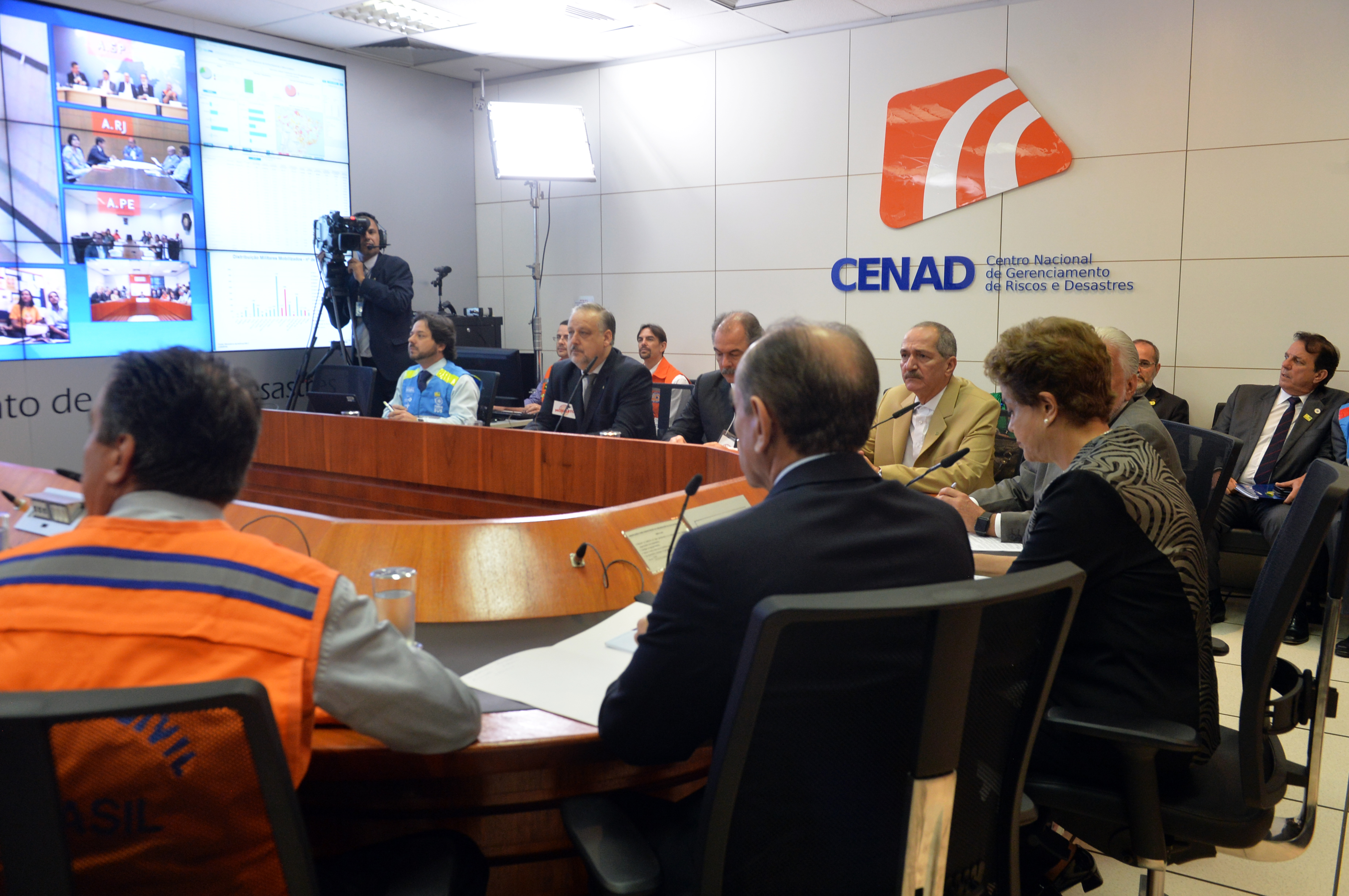 29/01/2016, Brasília - DF Fotos: Tereza Sobreira